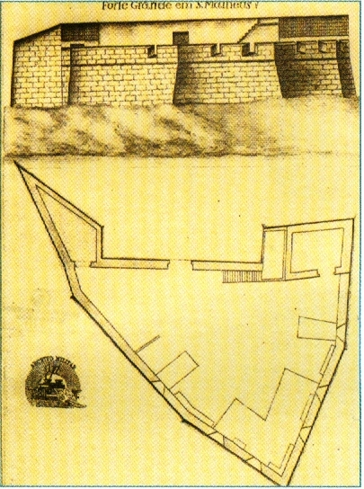 "Forte Grande em S. Matheus", s/d, autor desconhecido, Arquivo Histórico Militar, Lisboa. in MARTINS, José Salgado, "Património Edificado da Ilha Terceira: o Passado e o Presente". Separata da "Atlântida", vol. LII, 2007. p. 17. Também integrante da "Colecção de Plantas e Alçados de 32 Fortalezas dos Açores, por Joze Rodrigo d'Almeida em 1830", José Rodrigo de Almeida, 1830 (c.) GEAEM (346-1-8A-96), Lisboa, Portugal.